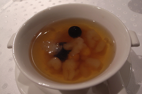 Red lotus hasma